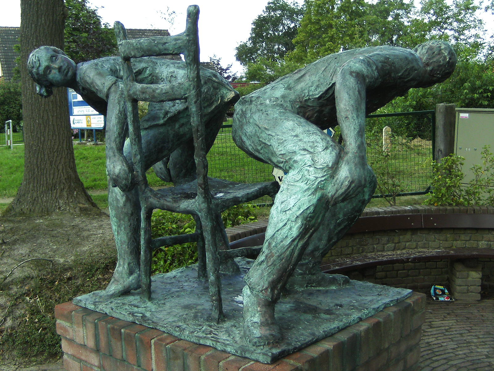 Stoelendans, brons van Judith van Westreenen in 1999 geplaatst aan de Bathemseweg te Lettele (Deventer) ter gelegenheid van 100 jaar Oranjecommissie Lettele